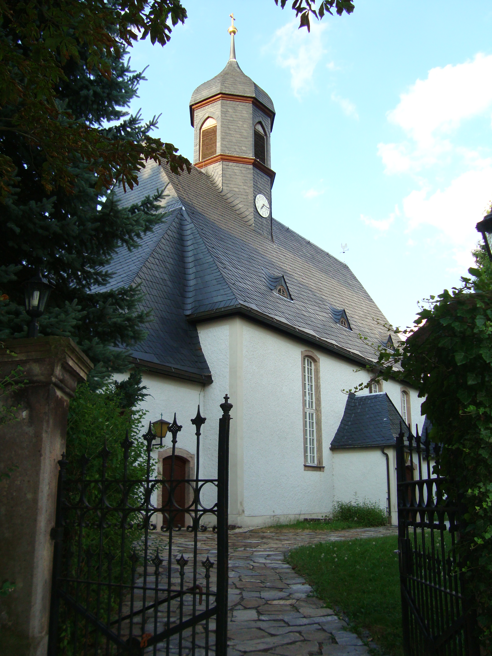 Kirche in Leukersdorf im Erzgebirge